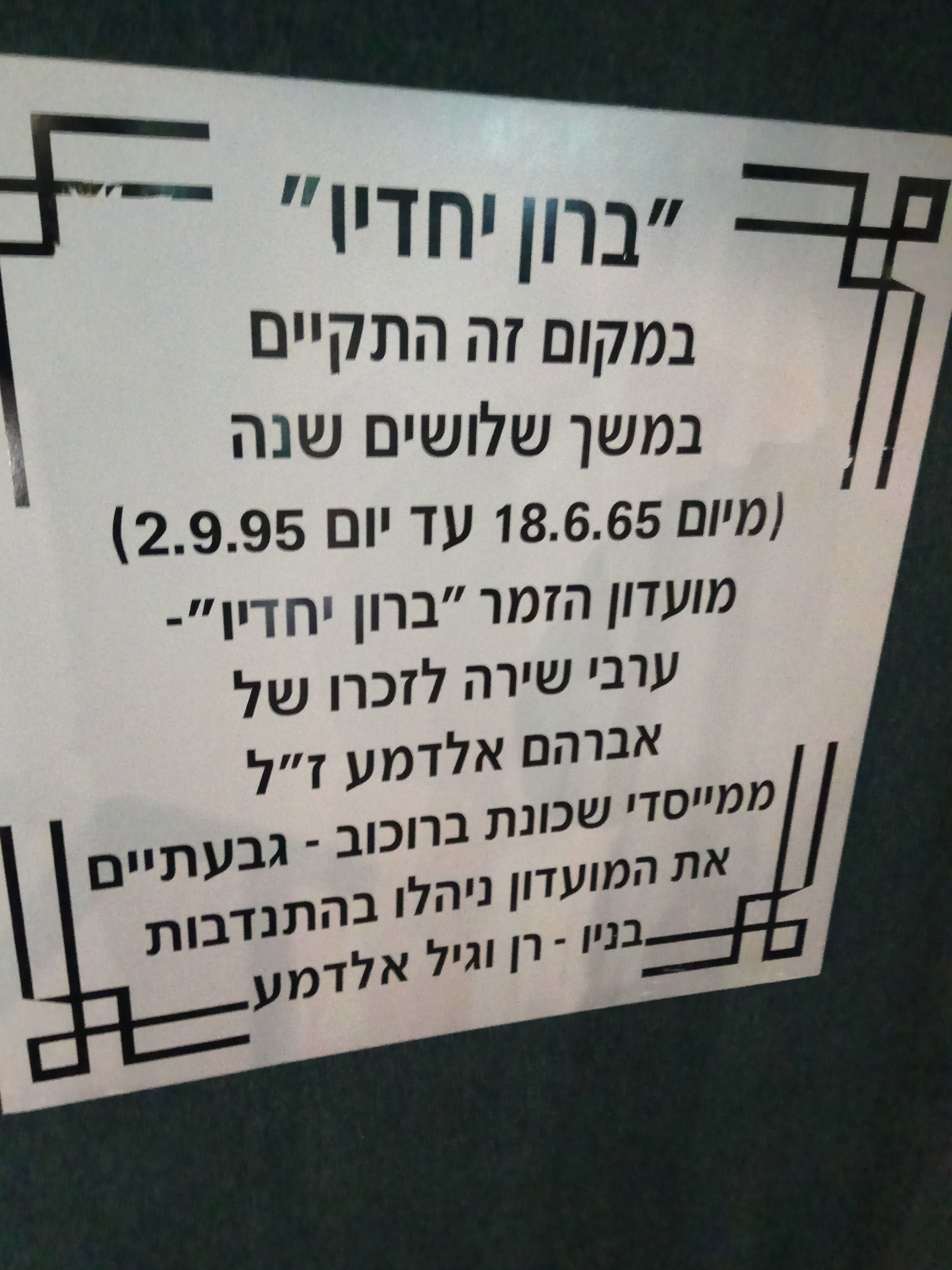 שלט הנצחה בבית ראשונים בגבעתיים